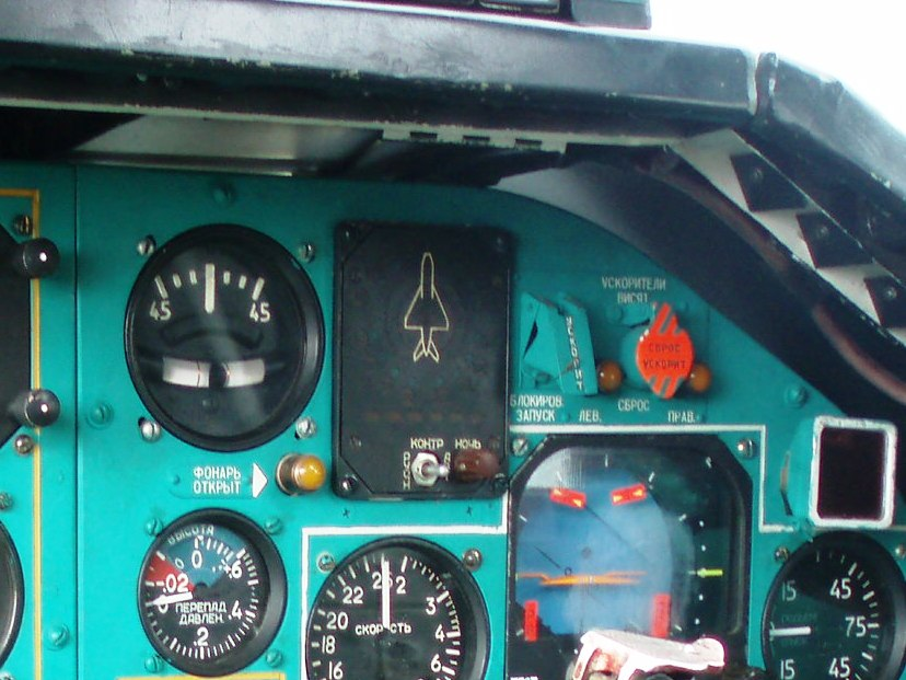 Пульт-индикатор СПО-15